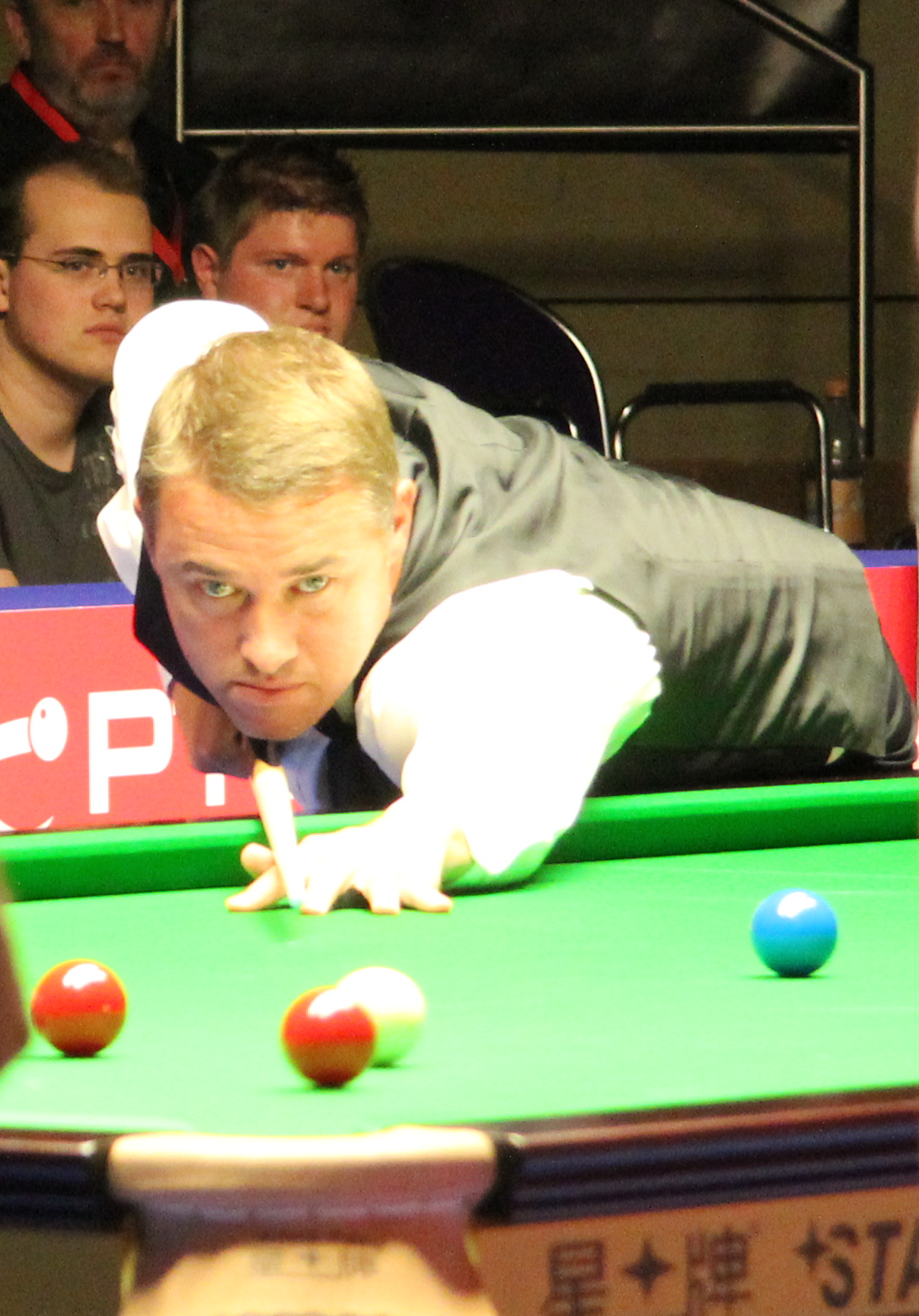 Stephen Hendry beim Paul Hunter Classic 2011